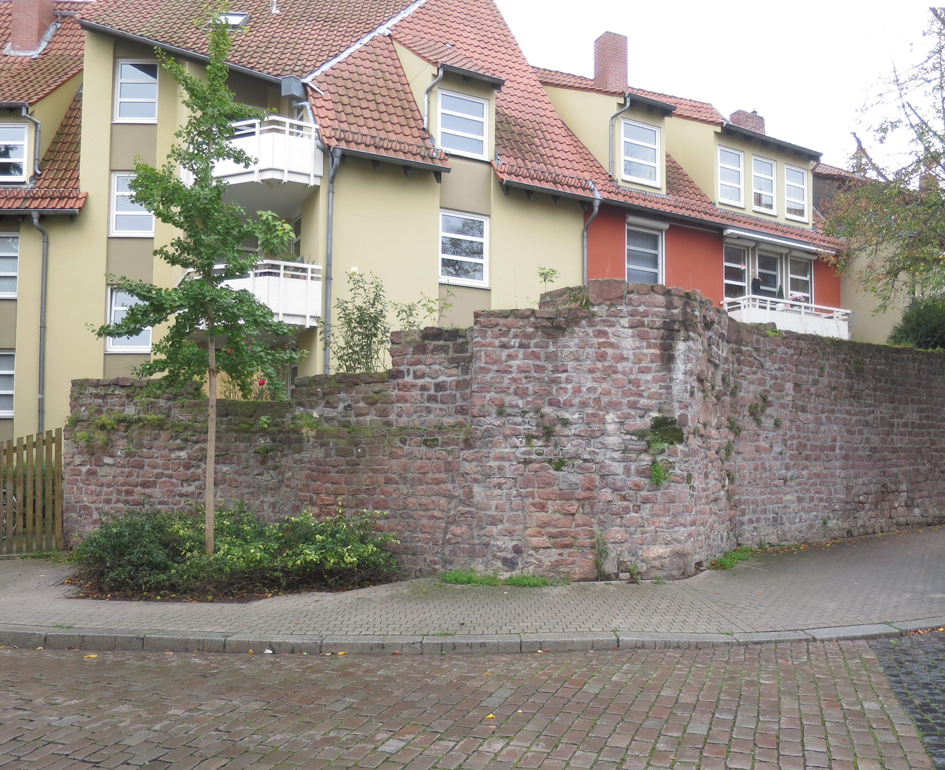 Sadtmauer Worms: Anschluss_der alten Ostmauer in der Bärengasse